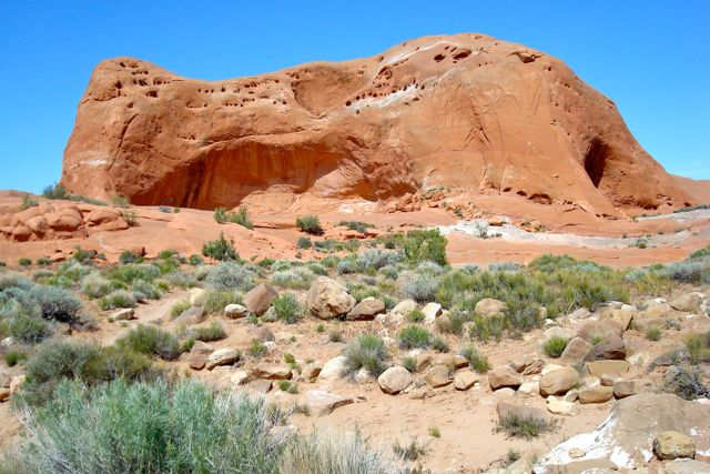 Dance Hall Rock from parking lot